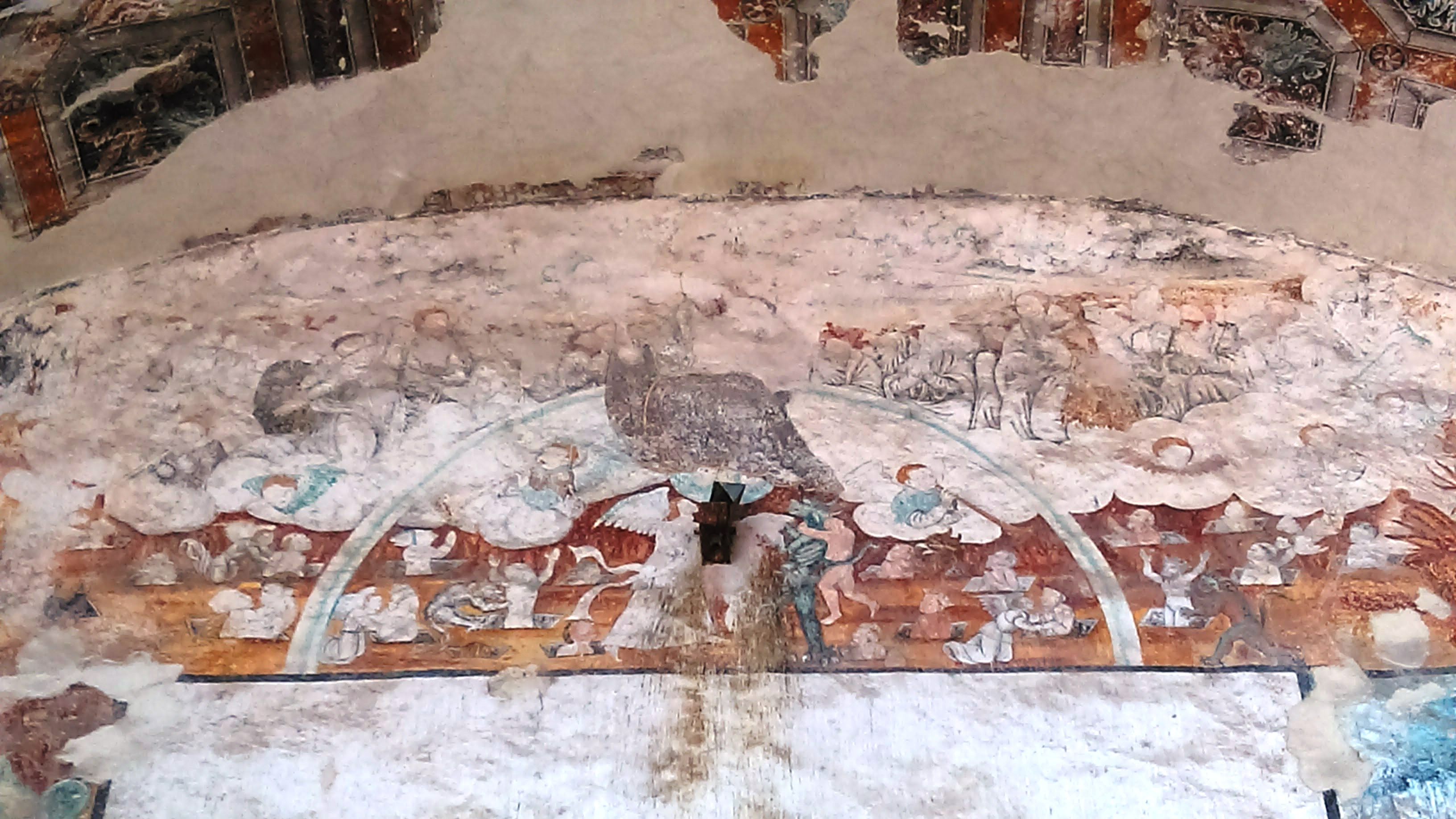 Mural del Muro este de la Capilla Abierta del Templo y exconvento de San Nicolás de Tolentino en Actopan, Hidalgo (México).